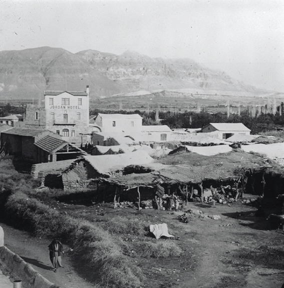 מאהל לצד מלון הירדן ביריחו